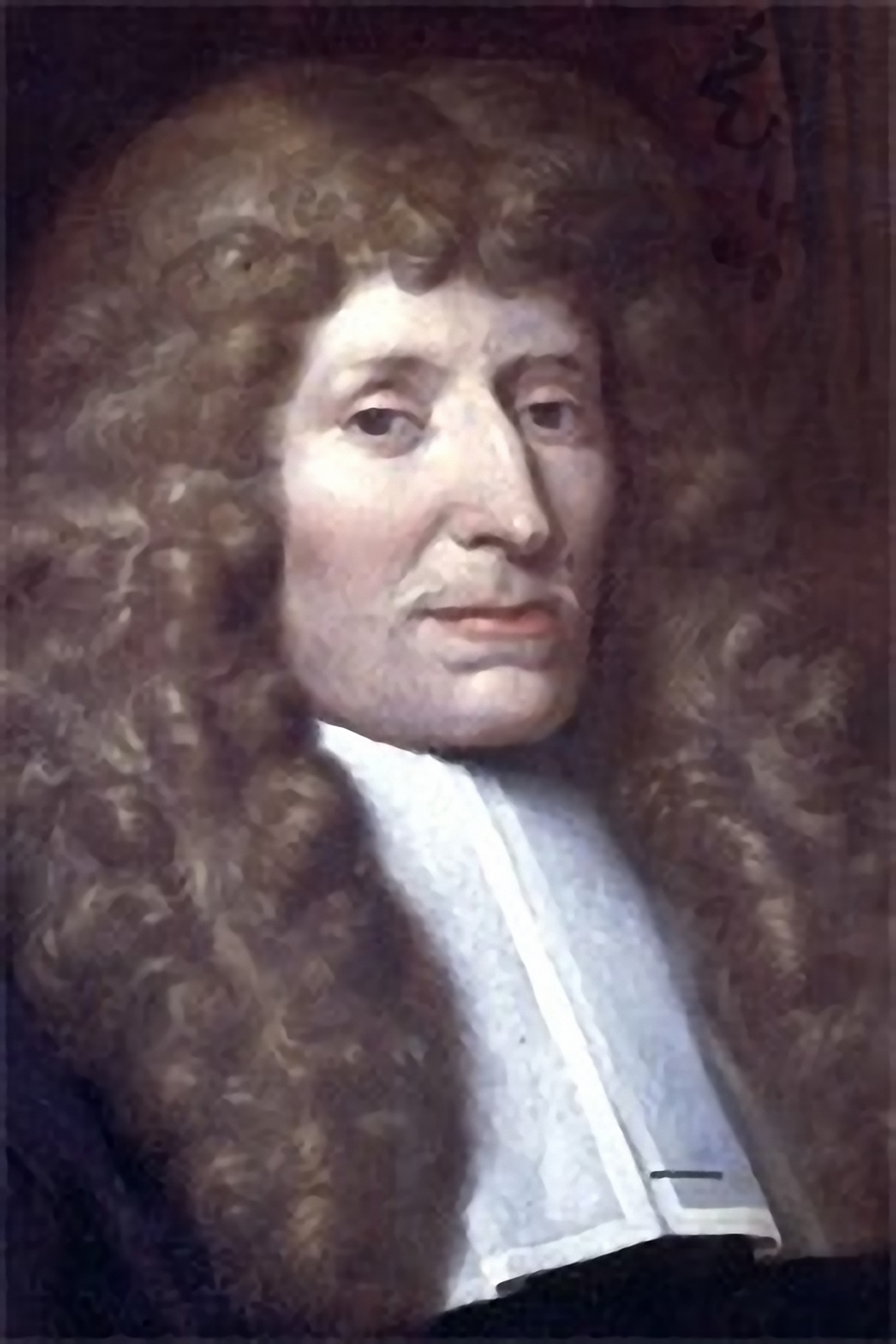 Cyprianus Regnerus van Oosterga, niederländischer Rechtswissenschaftler